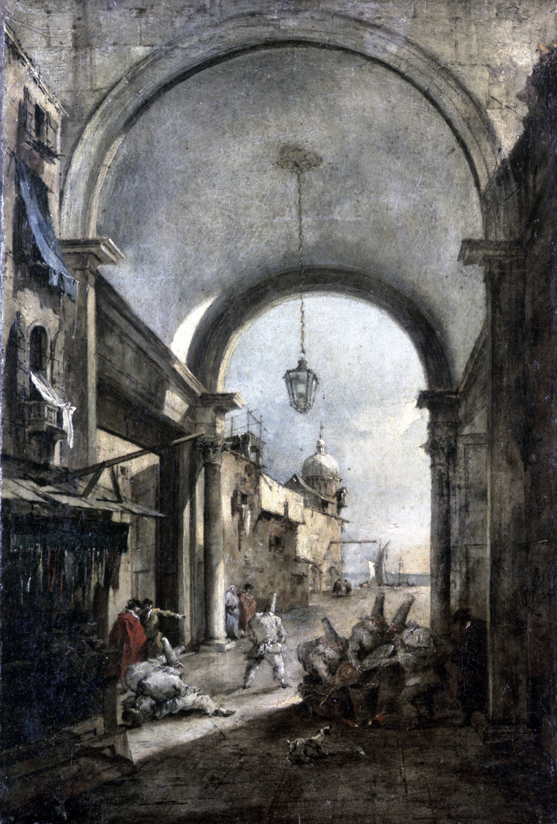 Architektur mit Karnevalsszene Öl, 44 x 30,5 cm Bergamo, Galleria dell'Accademia Carrara